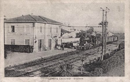 Lurate Caccivio, stazione con treno a vapore